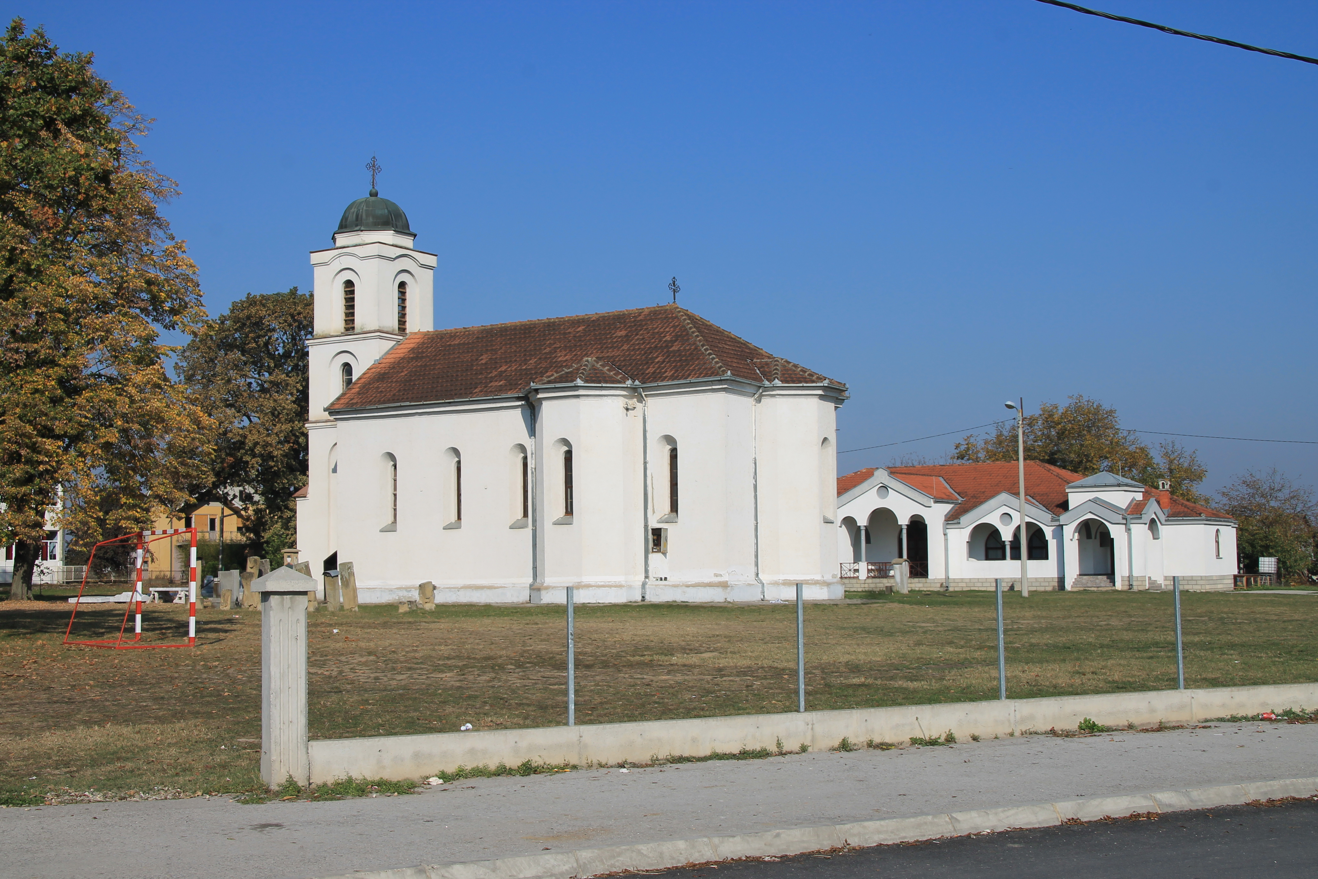 Crkva Sv. arhangela Gavrila (Zablaće)